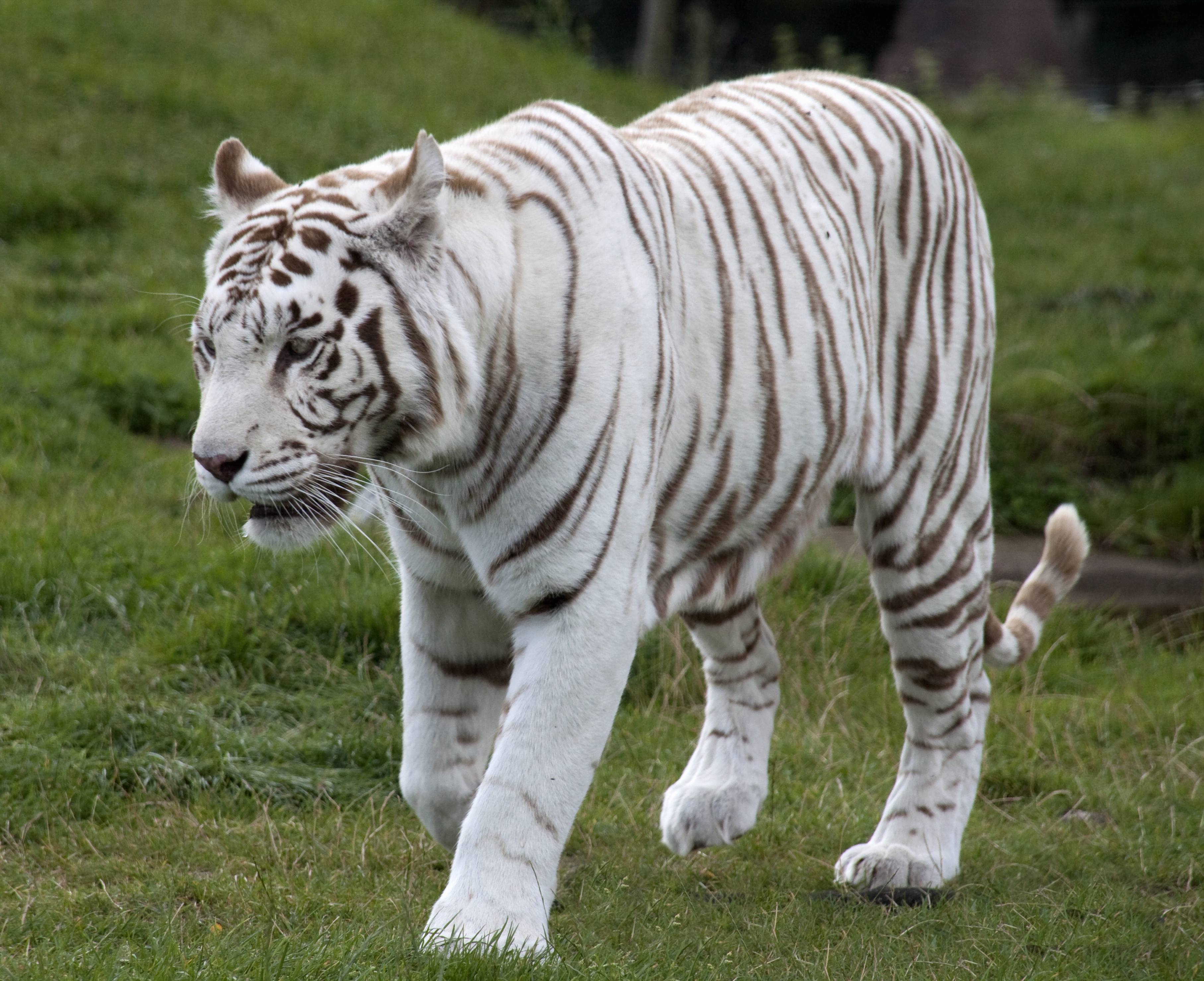 White Tiger 6